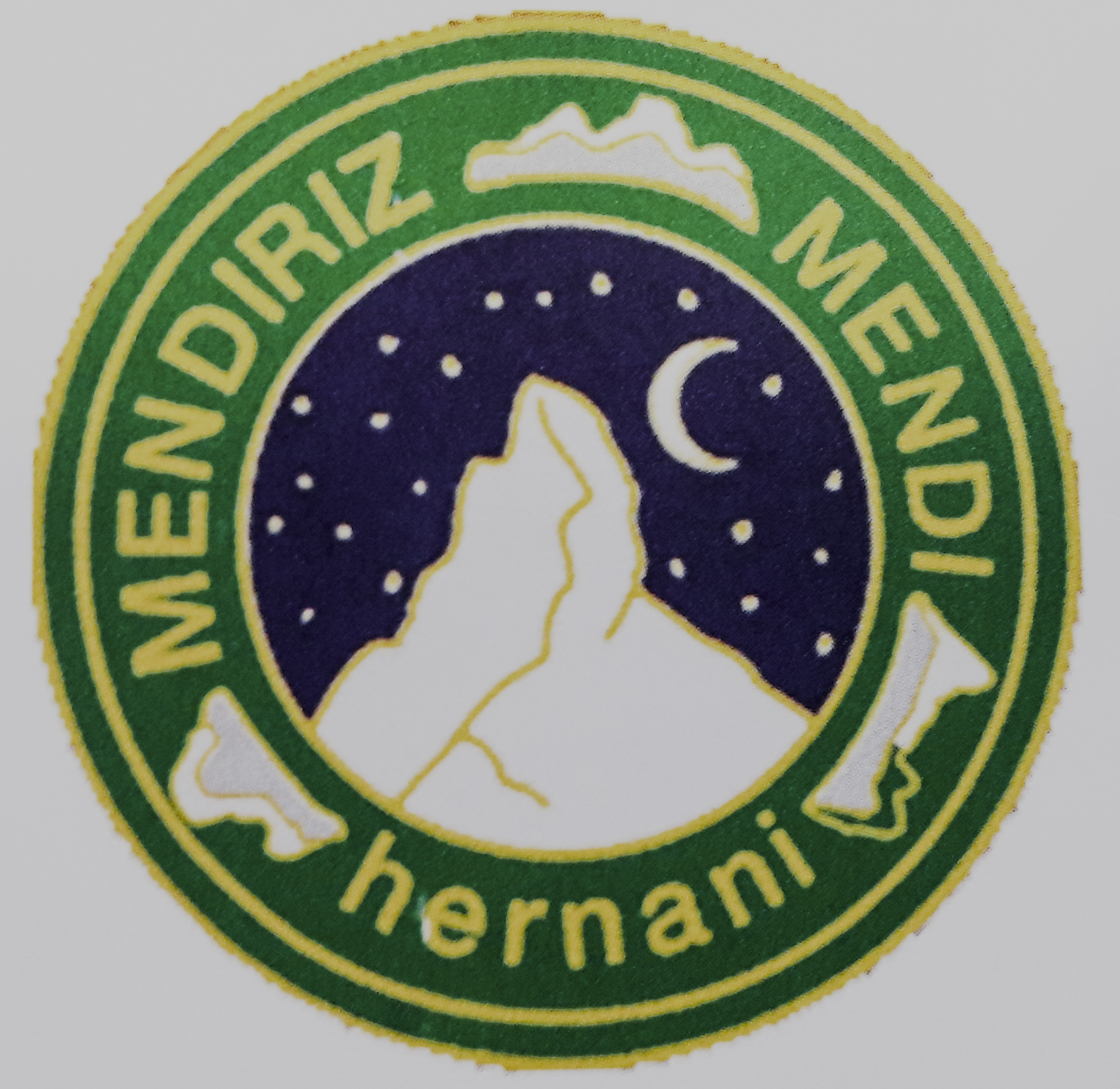 Mendiriz Mendi Elkartearen logoa